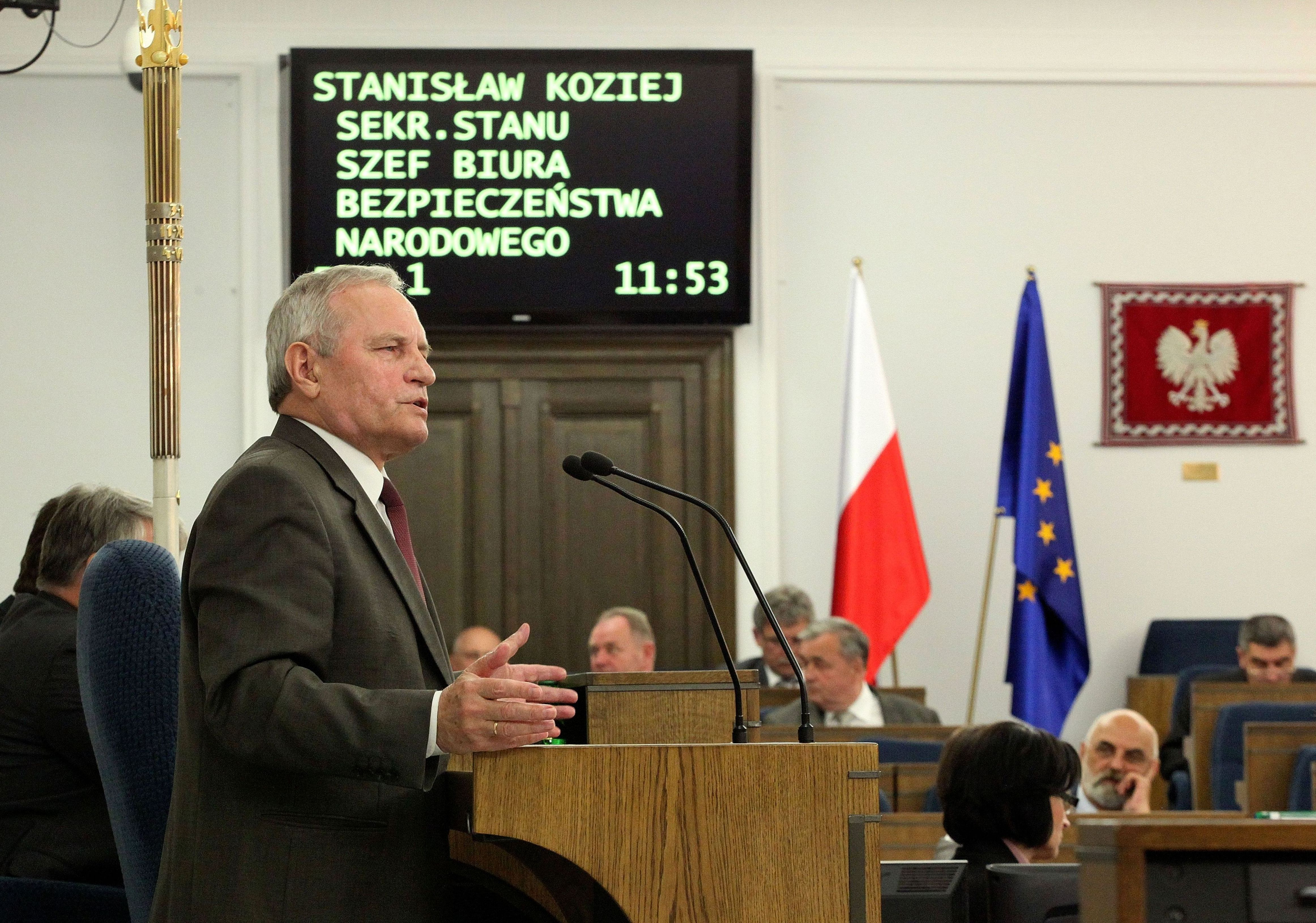 Szef Biura Bezpieczeństwa Narodowego Stanisław Koziej. 37. posiedzenie Senatu RP